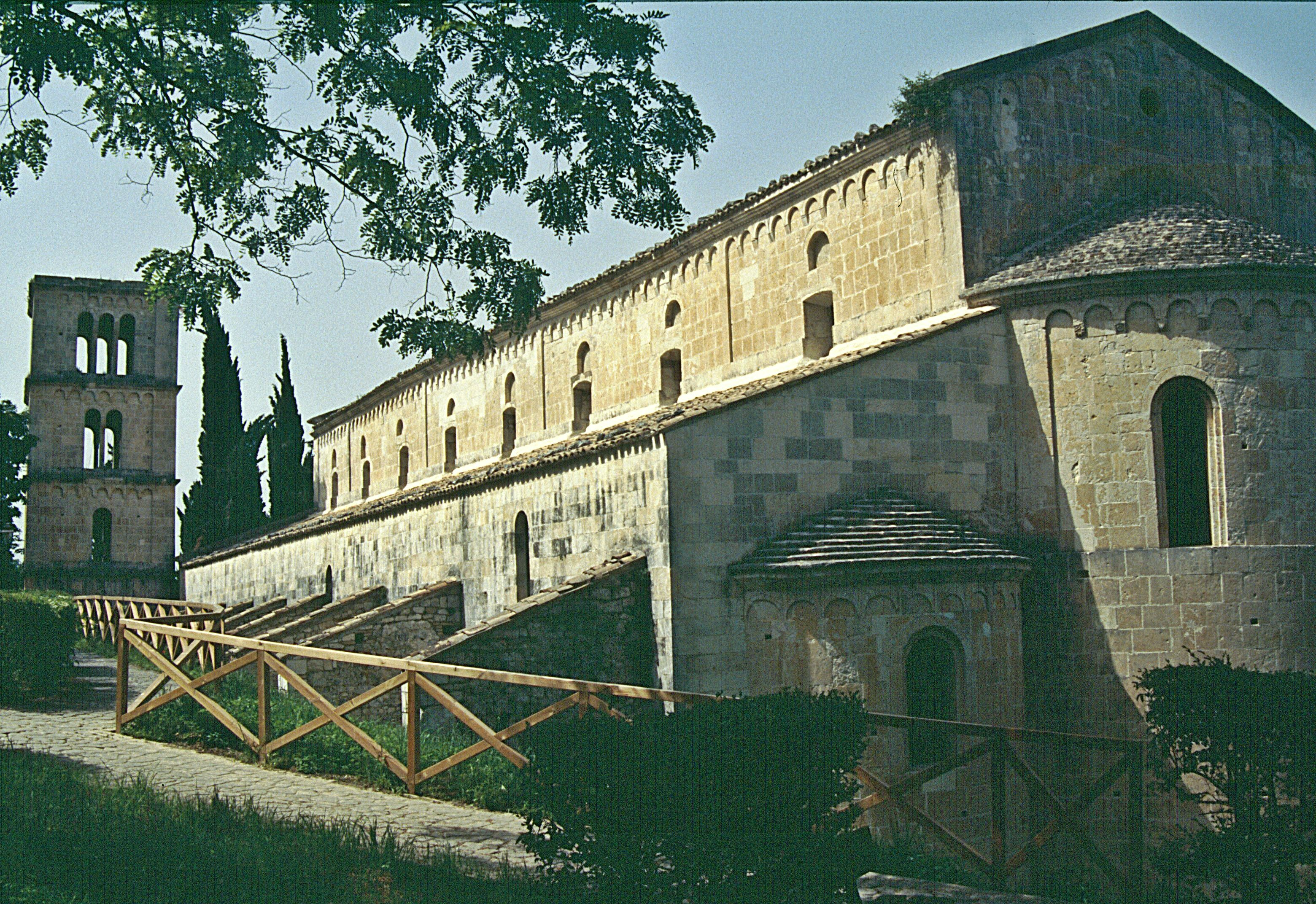 San Liberatore a Majella